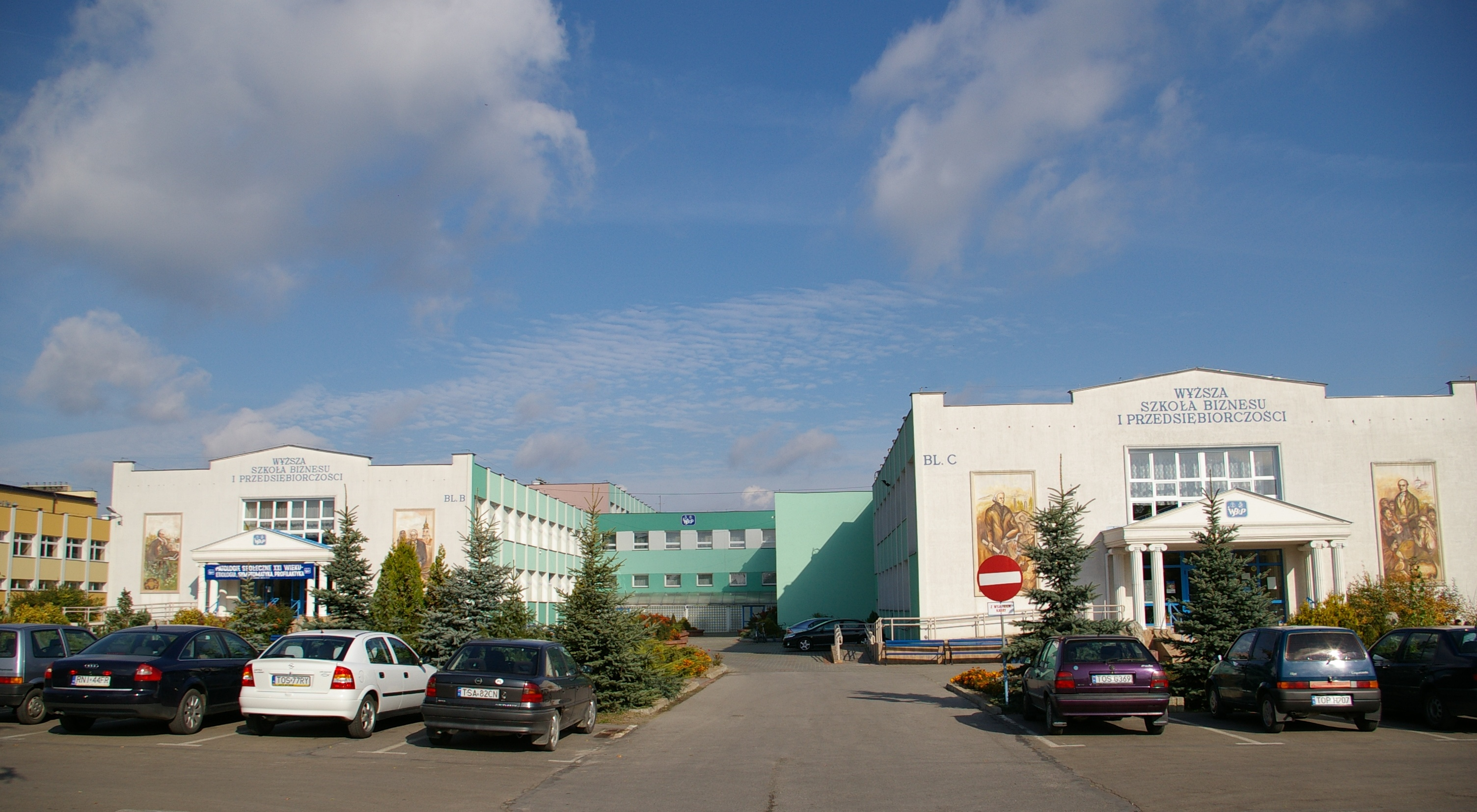 Wyższa Szkoła Biznesu i Przedsiębiorczości w Ostrowcu Świętokrzyskim